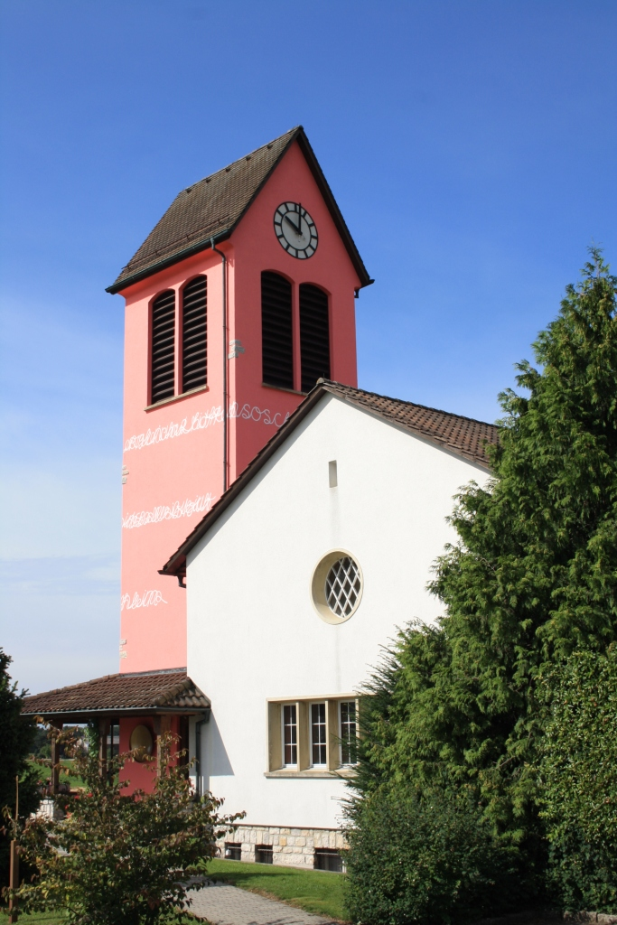 Reformierte Kirche